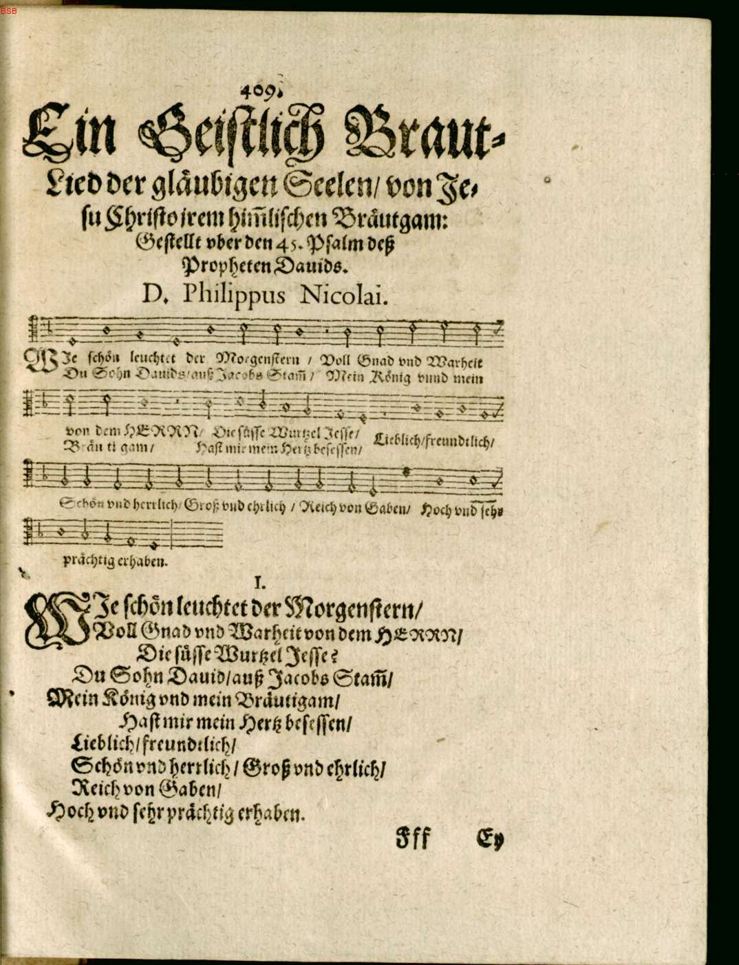 Scan from Frewdenspiegel deß ewigen Lebens p. 409: "Wie schön leuchtet der Morgenstern"